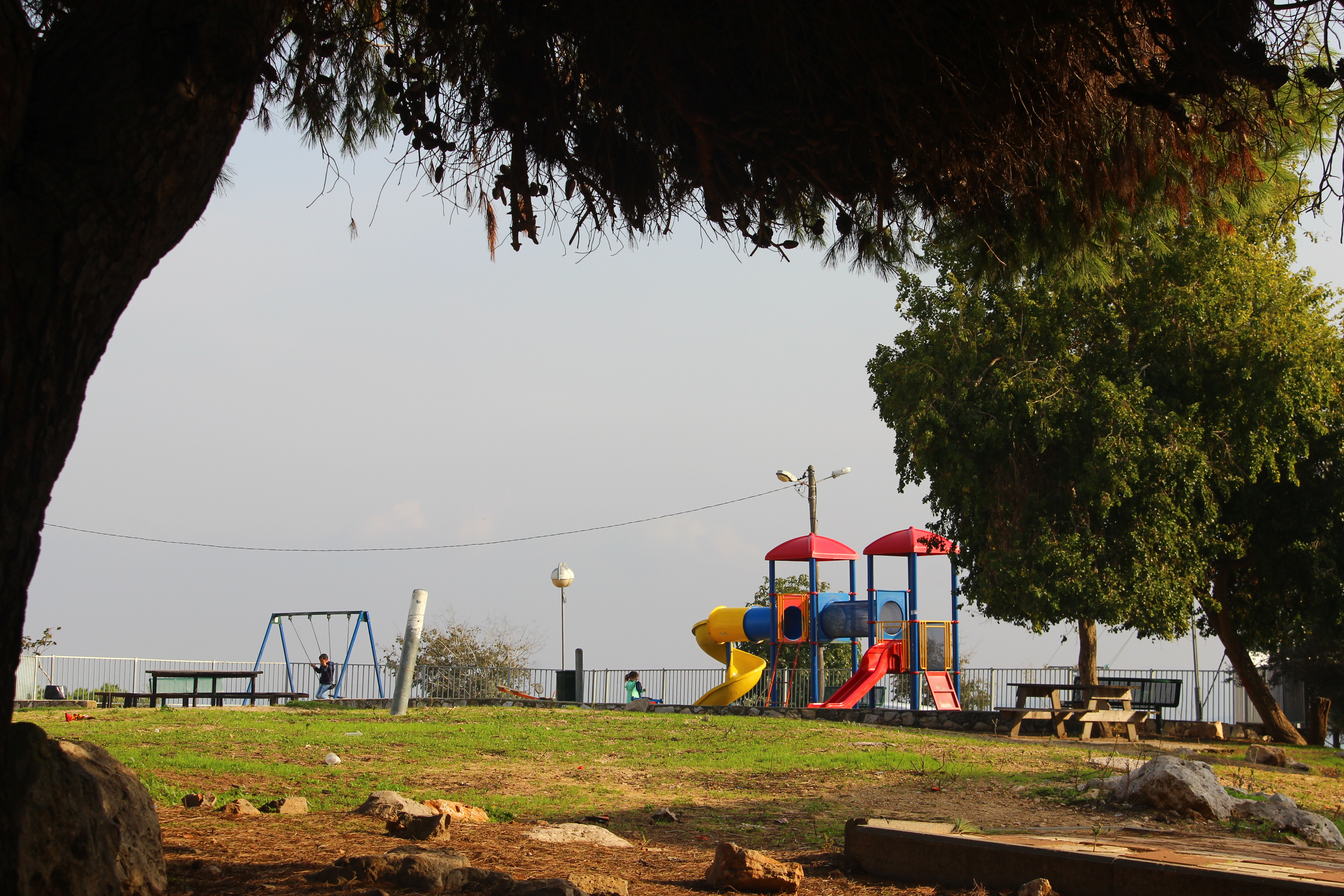 متنزه اسكندر - ام الفحم